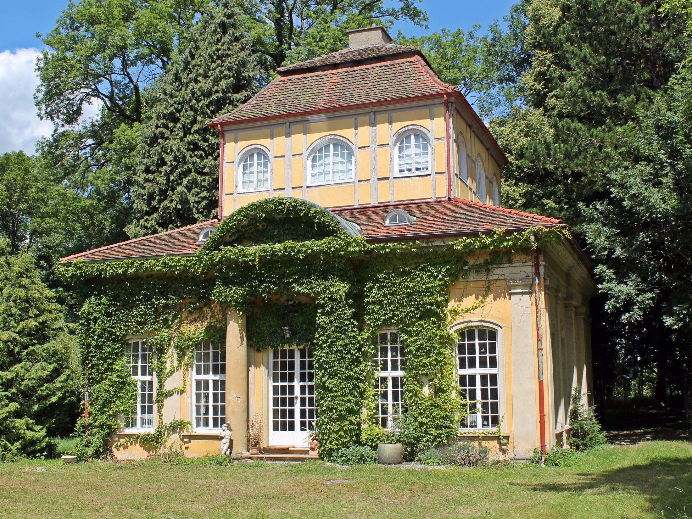 Hofgarten Bartenstein, Barockpavillon